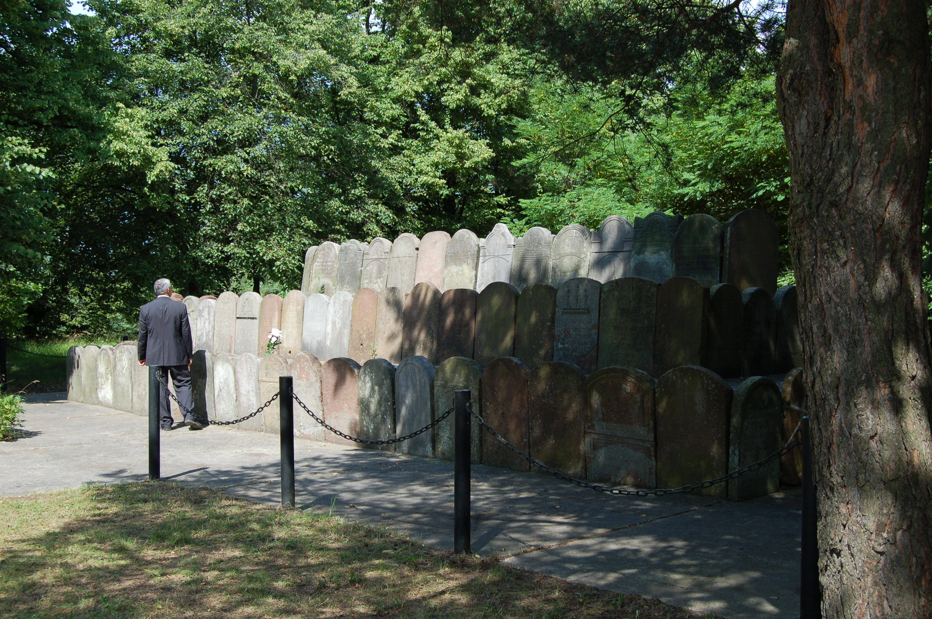 Kielce, cmentarz żydowski, 1870 r.